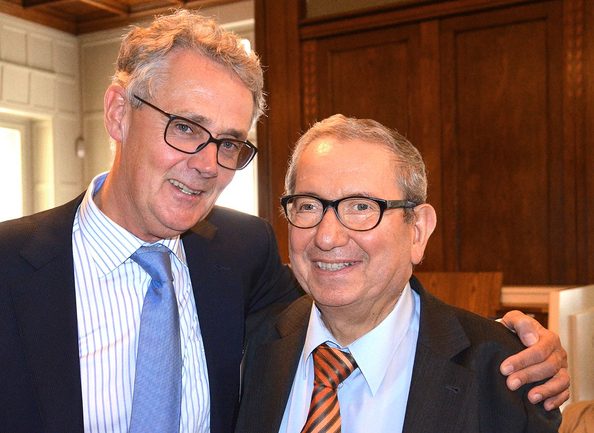 Am Nachmittag des 19. Juni 2016 während des gemeinsam von Andor Izsák und dem Freundeskreis Hannover zur Woche der Brüderlichkeit veranstalteten Sommerfestes in der Villa Seligmann: Der niedersächsische Regierungssprecher a.D. Dr. Franz Rainer Enste (links) mit dem Musikwissenschaftler, Dirigenten und Gastgeber Andor Izsák ...